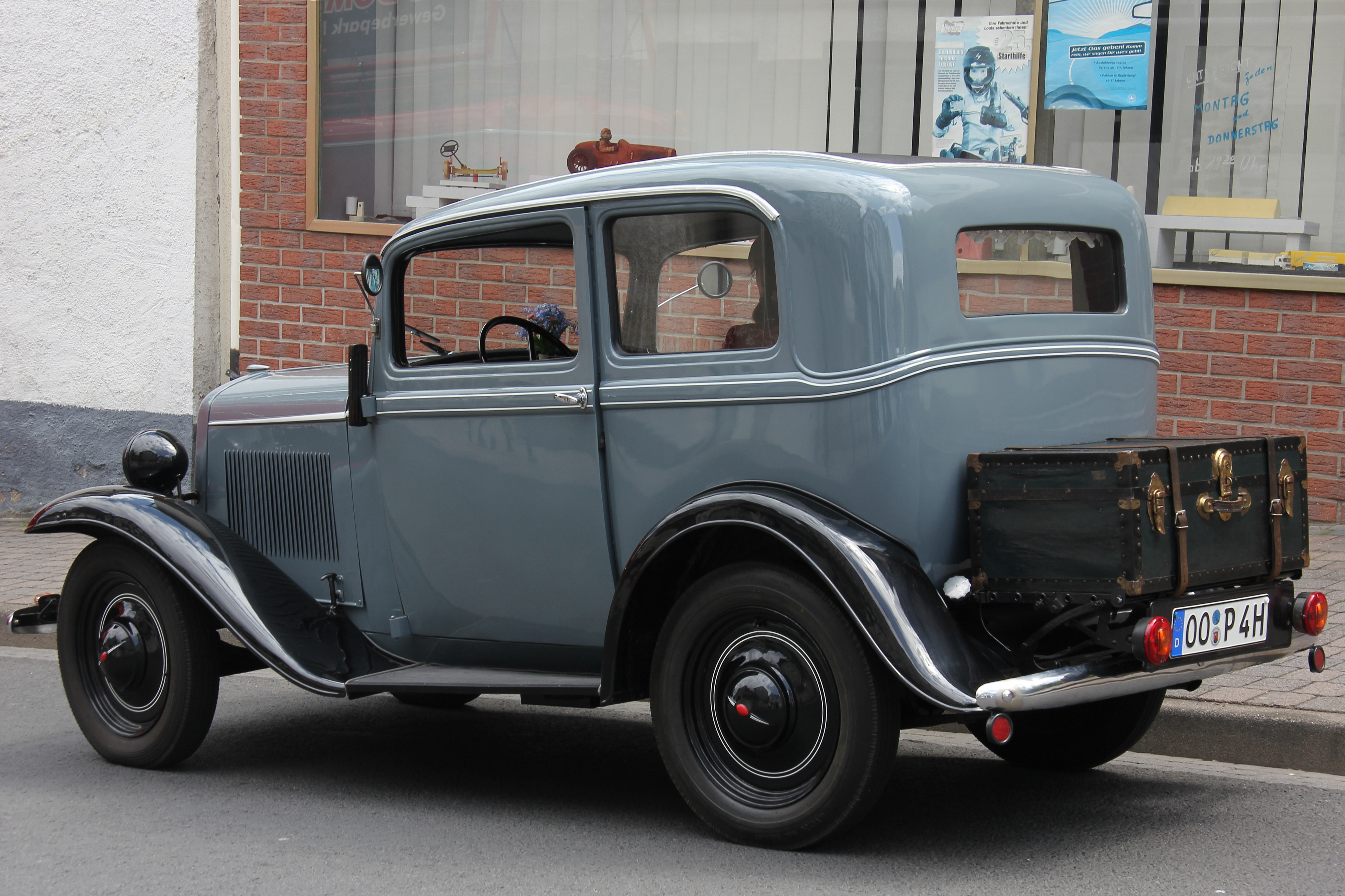 Opel P4, Baujahr 1936 (Phantasiekennzeichen)